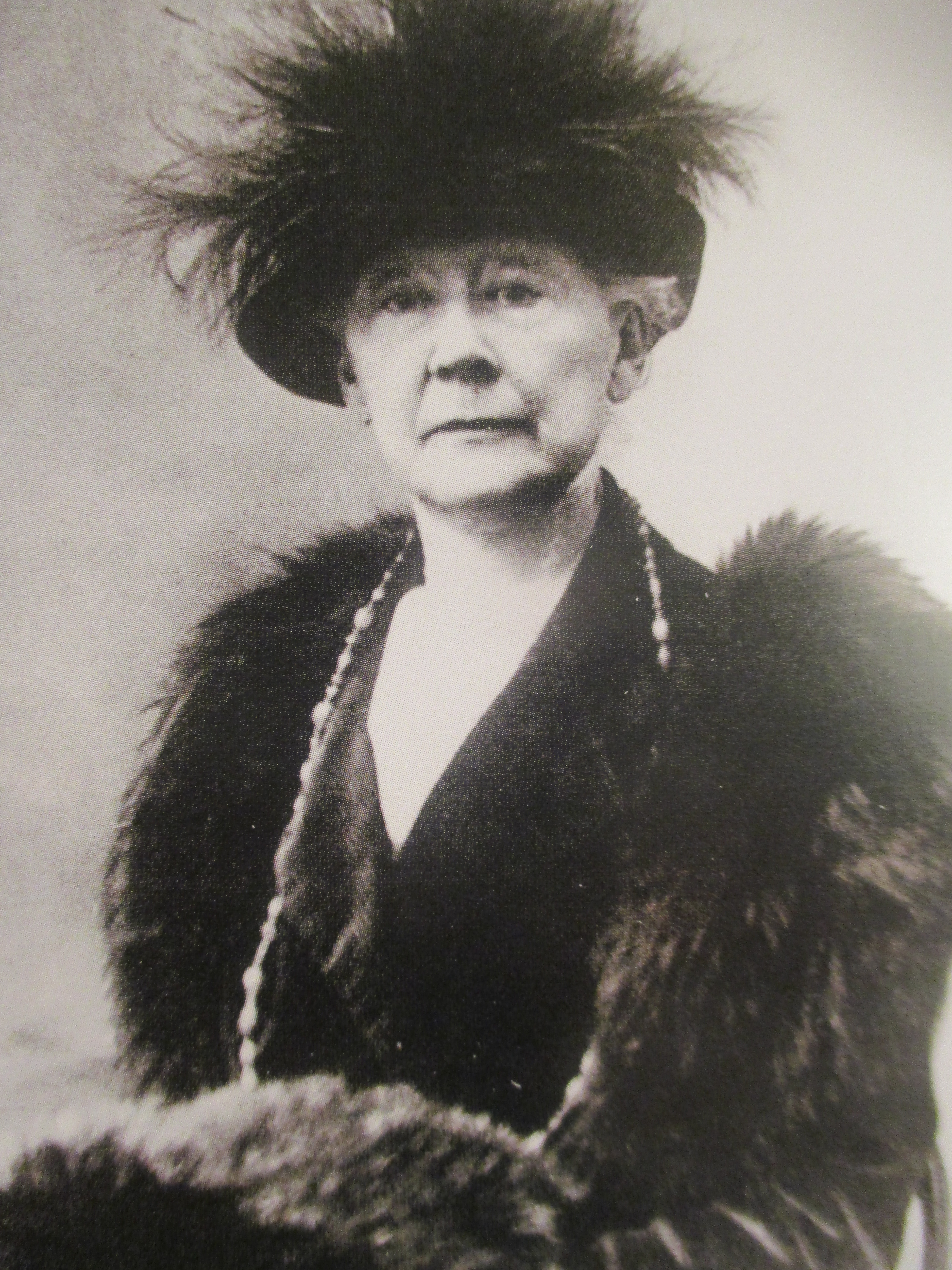 Mary Cassatt (1844-1926) en 1914.